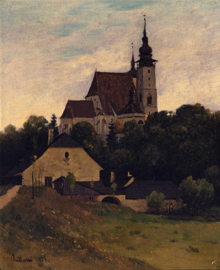 Antonín Chittussi: Z Jihlavy, Sv. Jakub